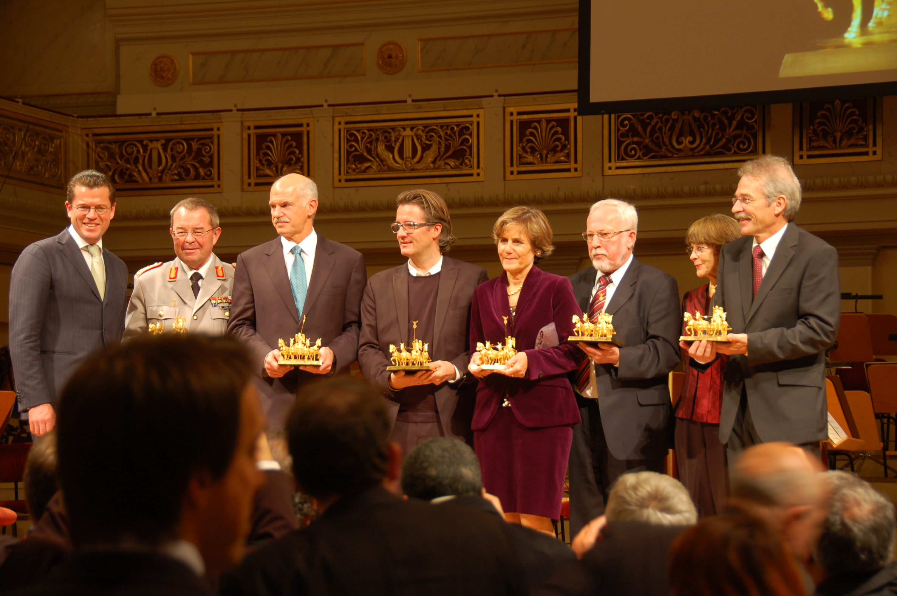 Preisverleihung Quadriga 2010. Die Preisträger (von Links nach Rechts): Die Bundeswehr, vertreten durch Karl-Theodor zu Guttenberg, Bundesverteidigungsminister, und Generalleutnant Günter Weiler, Stellvertreter des Generalinspekteurs der Bundeswehr. in der Kategorie Dienst der Verantwortung. Giorgos Papandreou, Ministerpräsident Griechenlands, für seine Kraft der Wahrhaftigkeit. Der dänische Künstler Olafur Eliasson in der Kategorie Kunst der Interaktion. Für die Architektur der Einheit Wolfgang Schäuble, durch Erkrankung verhindert und vertreten durch seine Ehefrau Ingeborg Schäuble, und Lothar de Maizière. Kristina und Albrecht Henning, Gründer des Sagarmatha Choudhary Eye Hospital in Lahan, Nepal in der Kategorie Licht der Empathie.